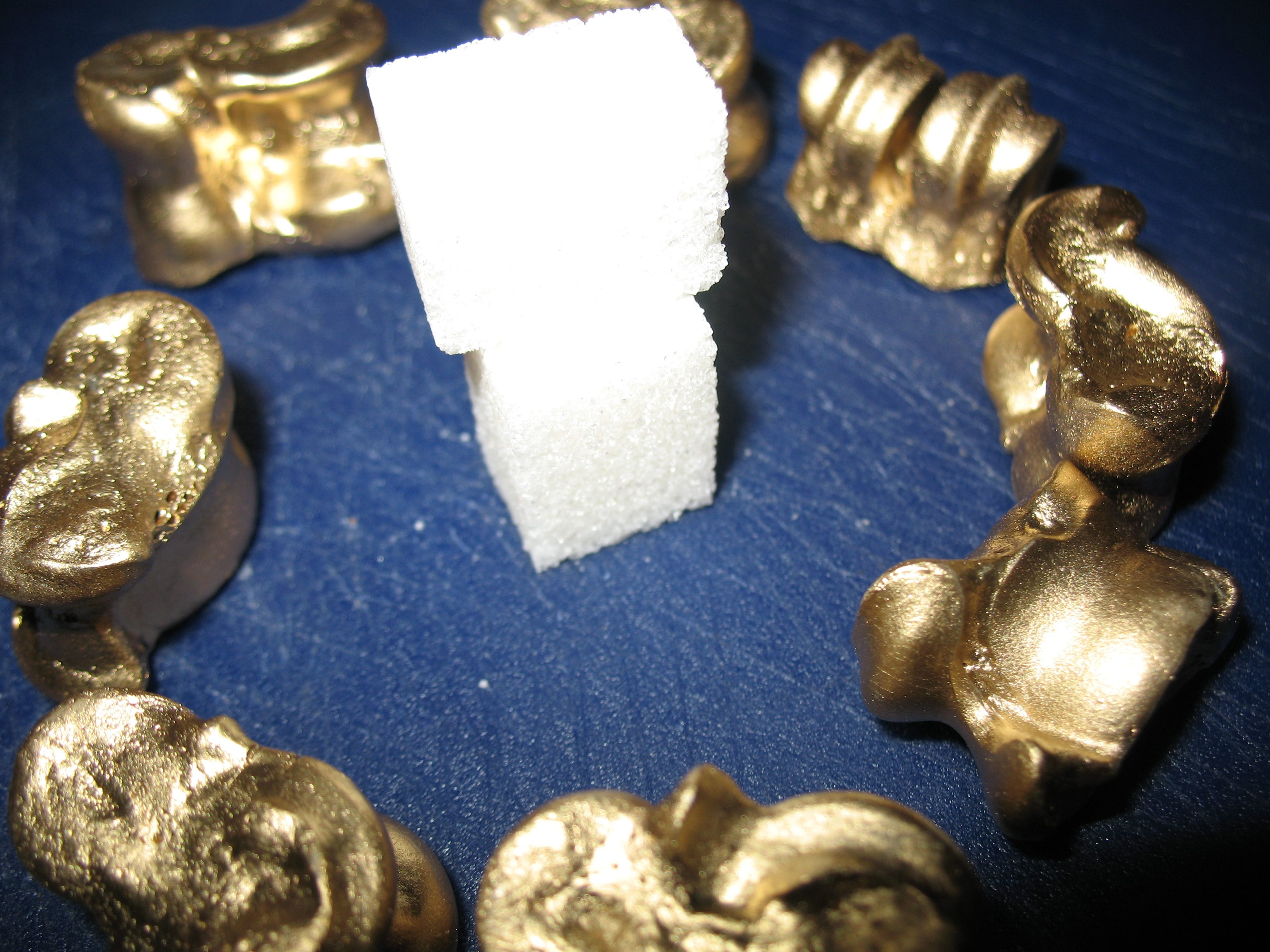 Кажыктарны куб чигир-биле деңнээни. Автору: Күжүгет Али. Agilight